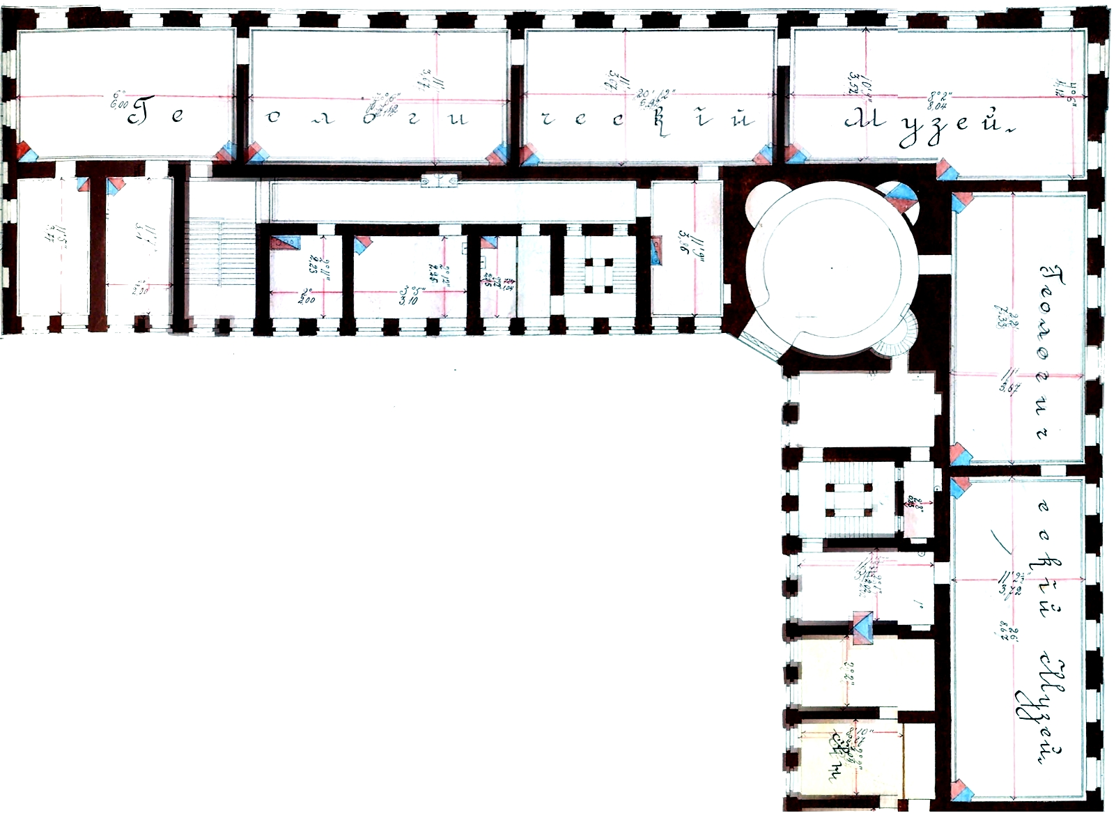 План геологического музея ИАН, 1907 год.